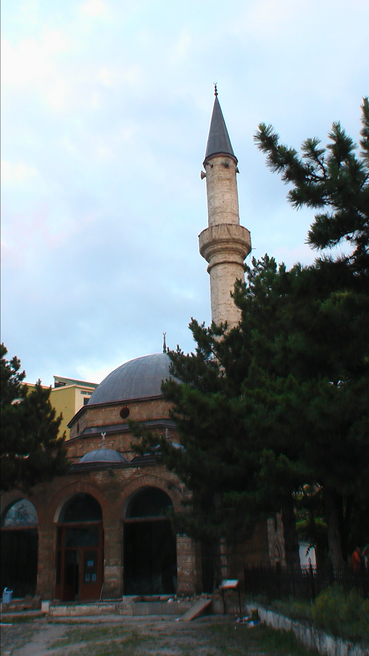 KorçaIliasMirahoriMoschee